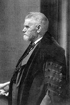 Jan Frans Heymans (1859-1932), rector RUG - Gent - Oost-Vlaanderen - België. Vader van Nobelprijswinnaar Corneel Heymans (1938).